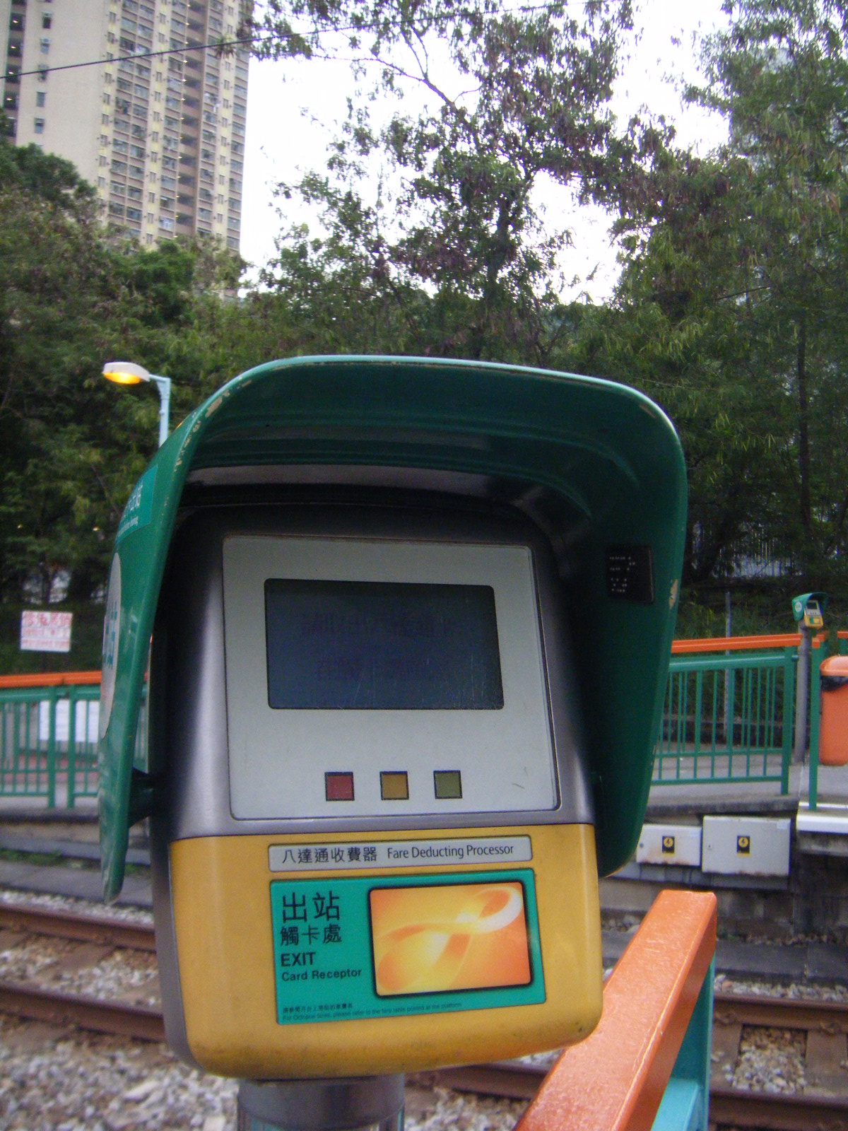 中文（香港）: 輕鐵八達通出站拍卡器